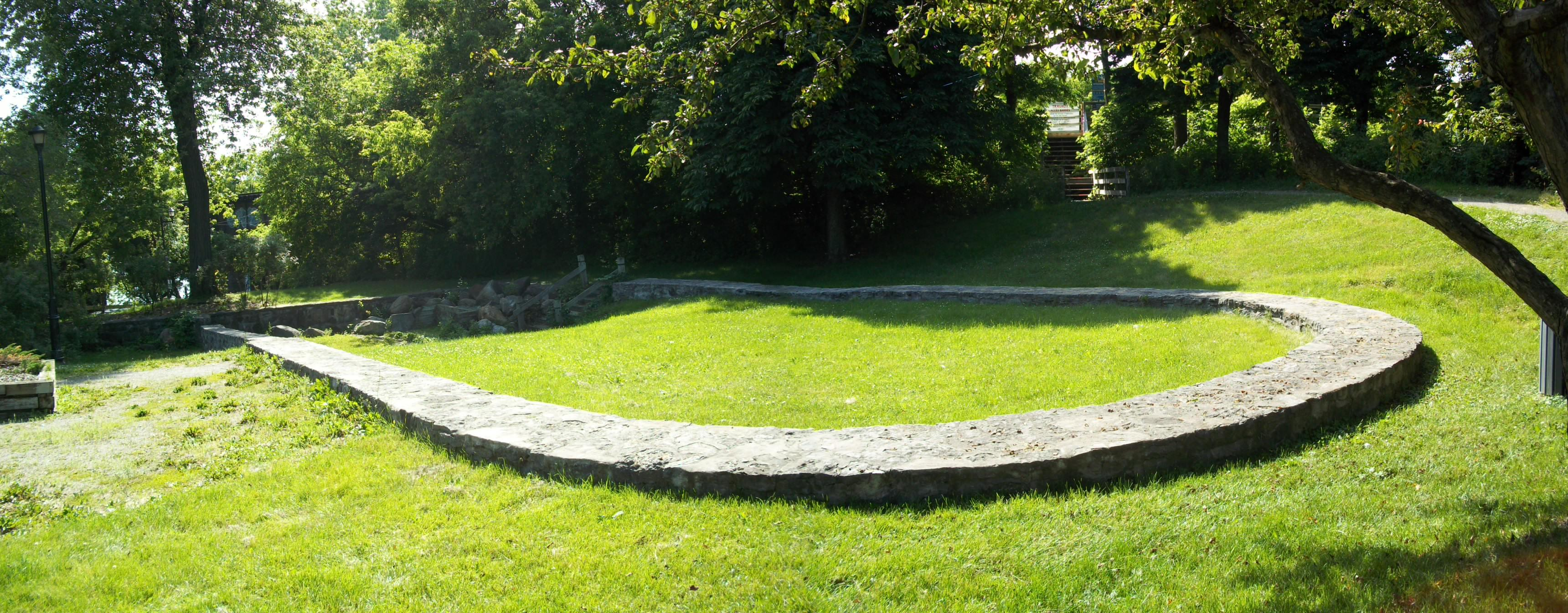 Site archéologique de l'Église-des-Saints-Anges-de-Lachine, parc des Saint-Anges, 9624, boulevard LaSalle, LaSalle, Montréal, Québec. On peut y voir le solage en forme de U de la deuxième église des Saints-Anges inaugurée en juillet 1703. L'église suivante, consacrée en 1865, a été construite plus à l'ouest, sur la rue Saint-Joseph à Lachine. Lieu patrimoniaux du Canada